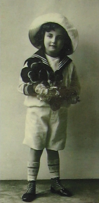 Matrosenanzug als Beispiel für Kinderkleidung. Abbildung von Infotafel in Freilichtmusuem Kürnbach